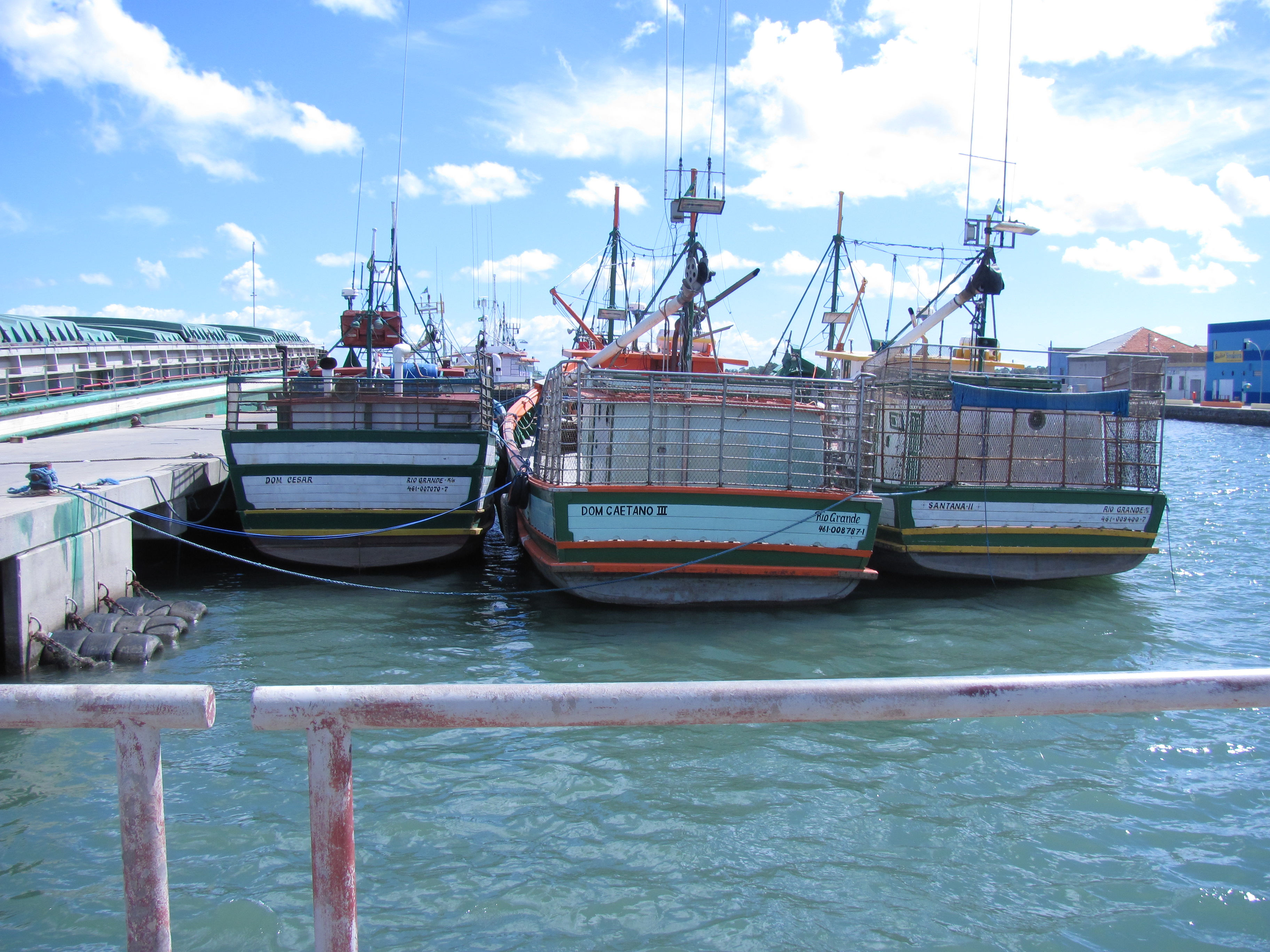 Barcos de Pesca